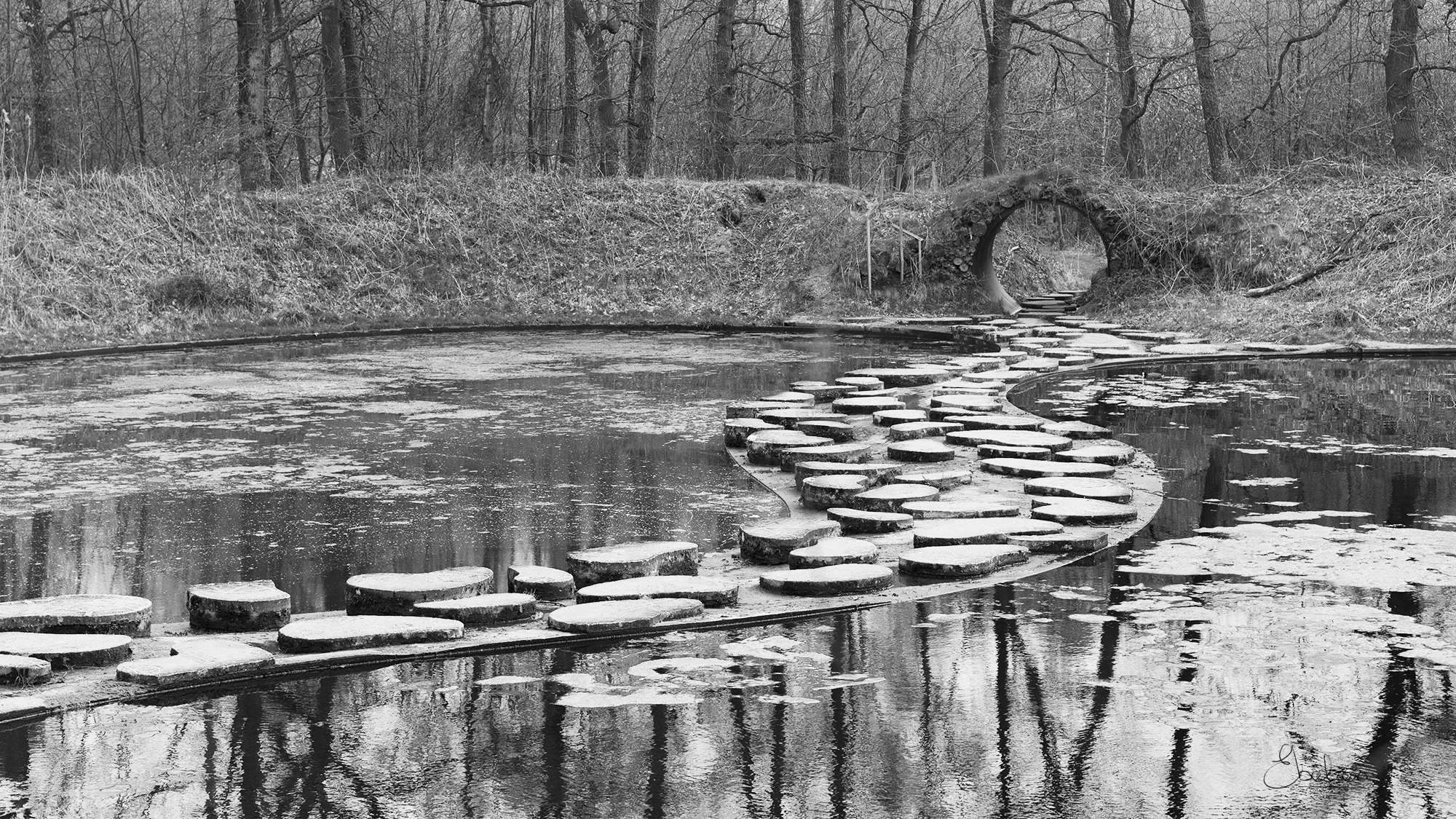 Stapstenen bij Het Lankheet Stepping stones at a waterpark